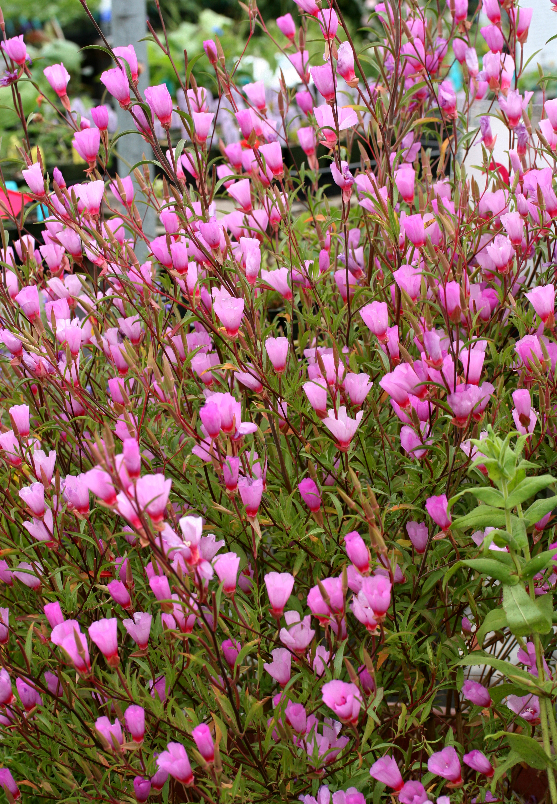 Clarkia rubicunda ssp. blasdalei